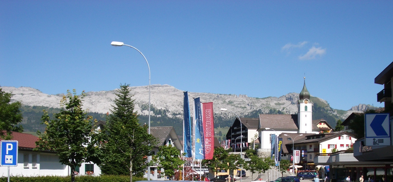 Sörenberg LU, Switzerland